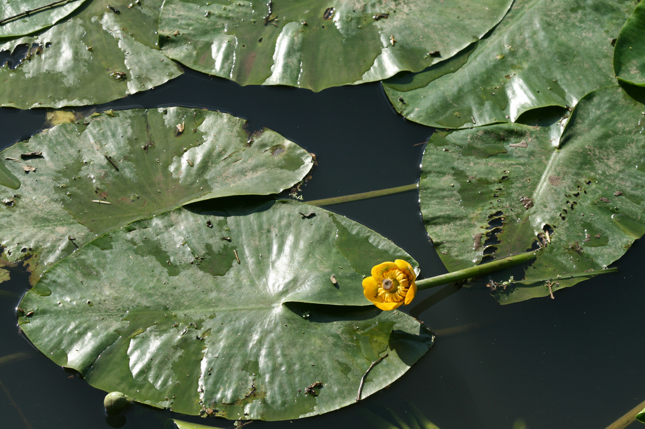 Nenuphare sur le Clain a Poitiers